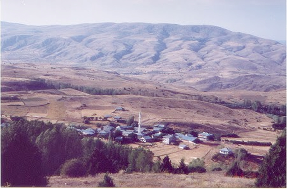 Köy Soranoğlu tarafından kurulmuştur.